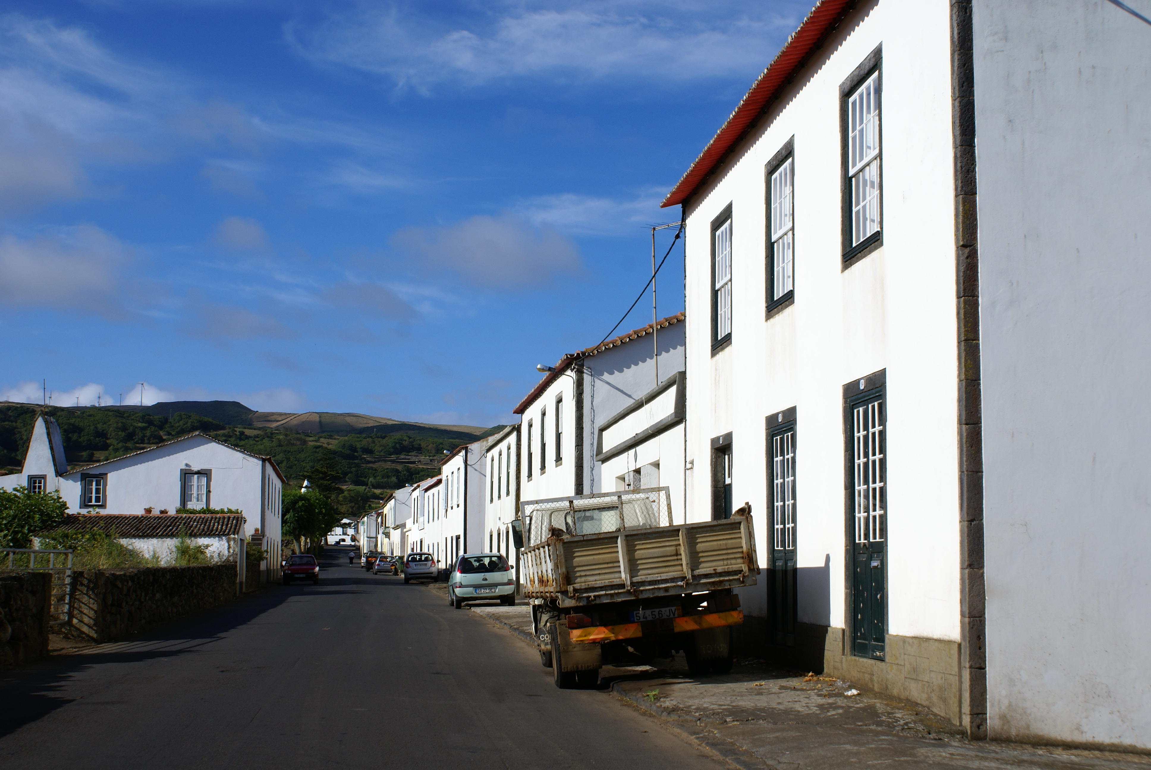 Guadalupe, vista parcial, ilha Graciosa, Açores, Portugal